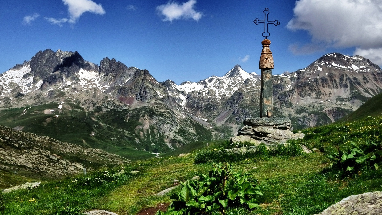 Col de la Croix-de-Fer, Savoie, france Altitude 2 067 m (6,781 ft)